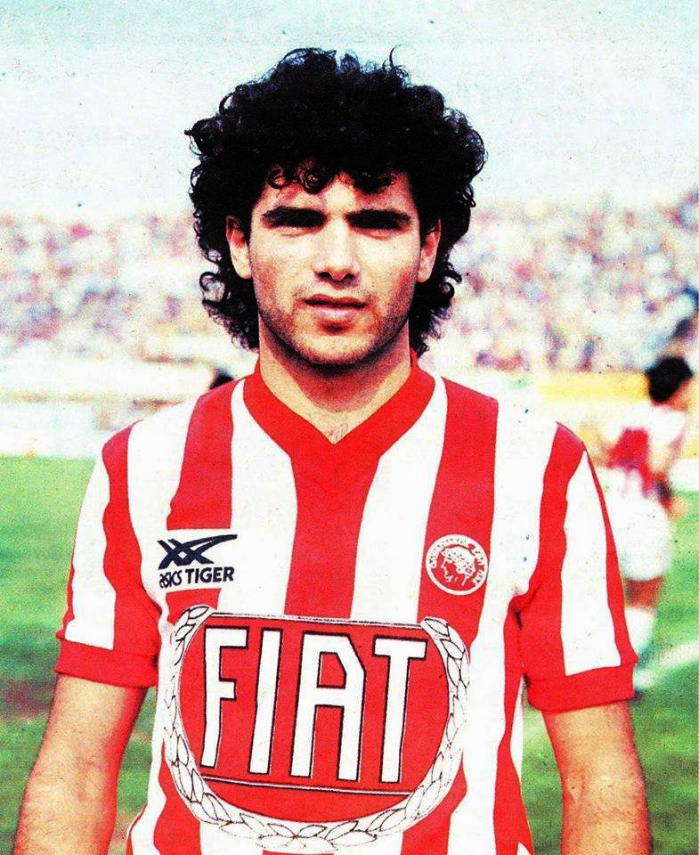 Ο Γιώργος Κοκολάκης πριν τον αγώνα ΑΕΚ-ΟΛΥΜΠΙΑΚΟΣ 1-1 στην Νέα Φιλαδέλφεια